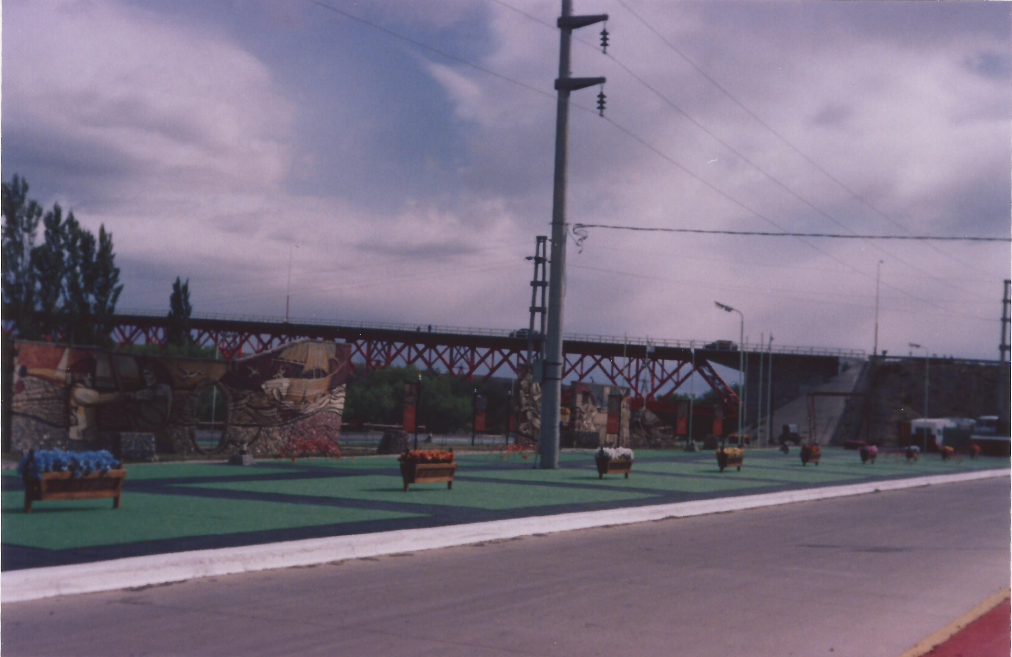 Plaza costera en el río Santa Cruz, en Comandante Luis Piedrabuena, Santa Cruz, Patagonia, Argentina en enero de 2008